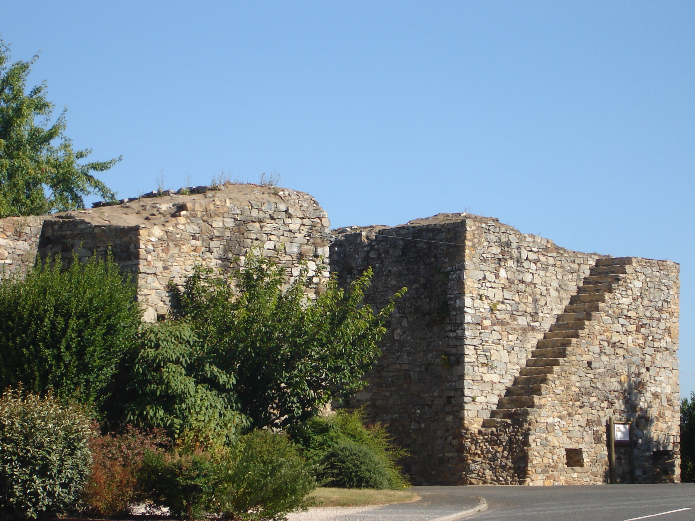 Porte guerchoise à Châtelais (Maine-et-Loire)